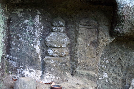 板碑の彫込